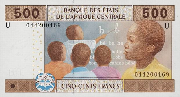 Купюра в 500 франков КФА. Лицевая сторона